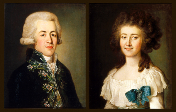 Камеженков Е.Д. Парный портрет Федора Фёдоровича Вадковского (1764-1806) и Екатерины Ивановны Вадковской, ур. Чернышёвой, родители декабриста Ф.Ф.Вадковского. 1789 г.F.A.Kovalenko Art Museum Федор Федорович Вадковский (1756 - 1806) и его жена Екатерина Ивановна Чернышева (1766 - 1830)